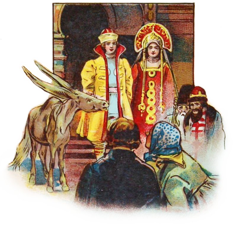 Иллюстрация Н. А. Богатова к книге «Конёк-Горбунок». Книгоиздательство торгового дома Евдокии Конваловой